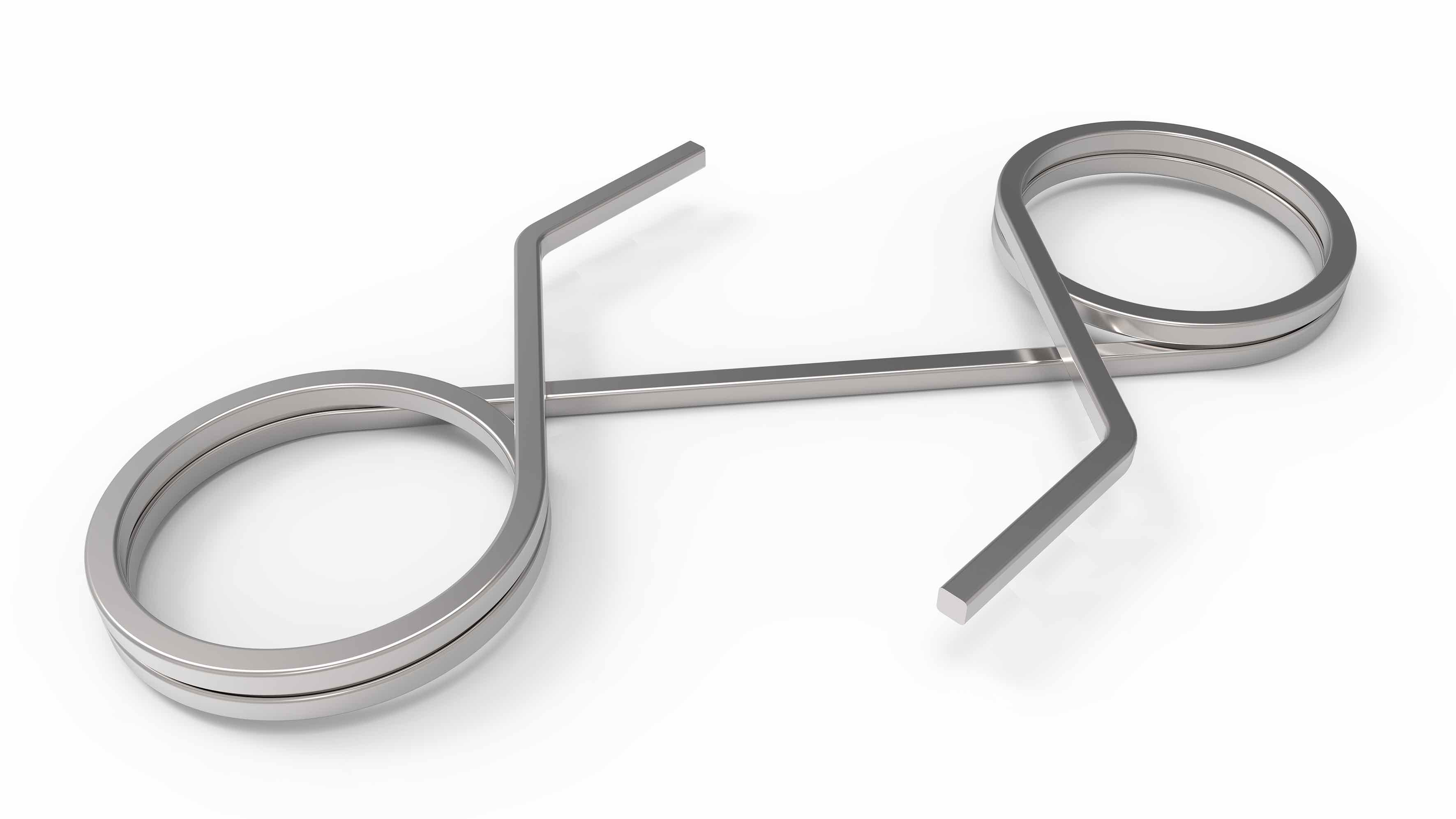 Auch der Checklock SQ verbindet zwei Radmuttern miteinander, hat aber keine Indikatorfunktion, sondern dient als Positionshalter. Nach Anziehen der Radmuttern hält der Checklock diese in ihrer Position. Die spezielle eckige Form des Federdrahts aus Edelstahl gewährleistet, dass sich der Checklock SQ exakt an die Radmuttern anlegt